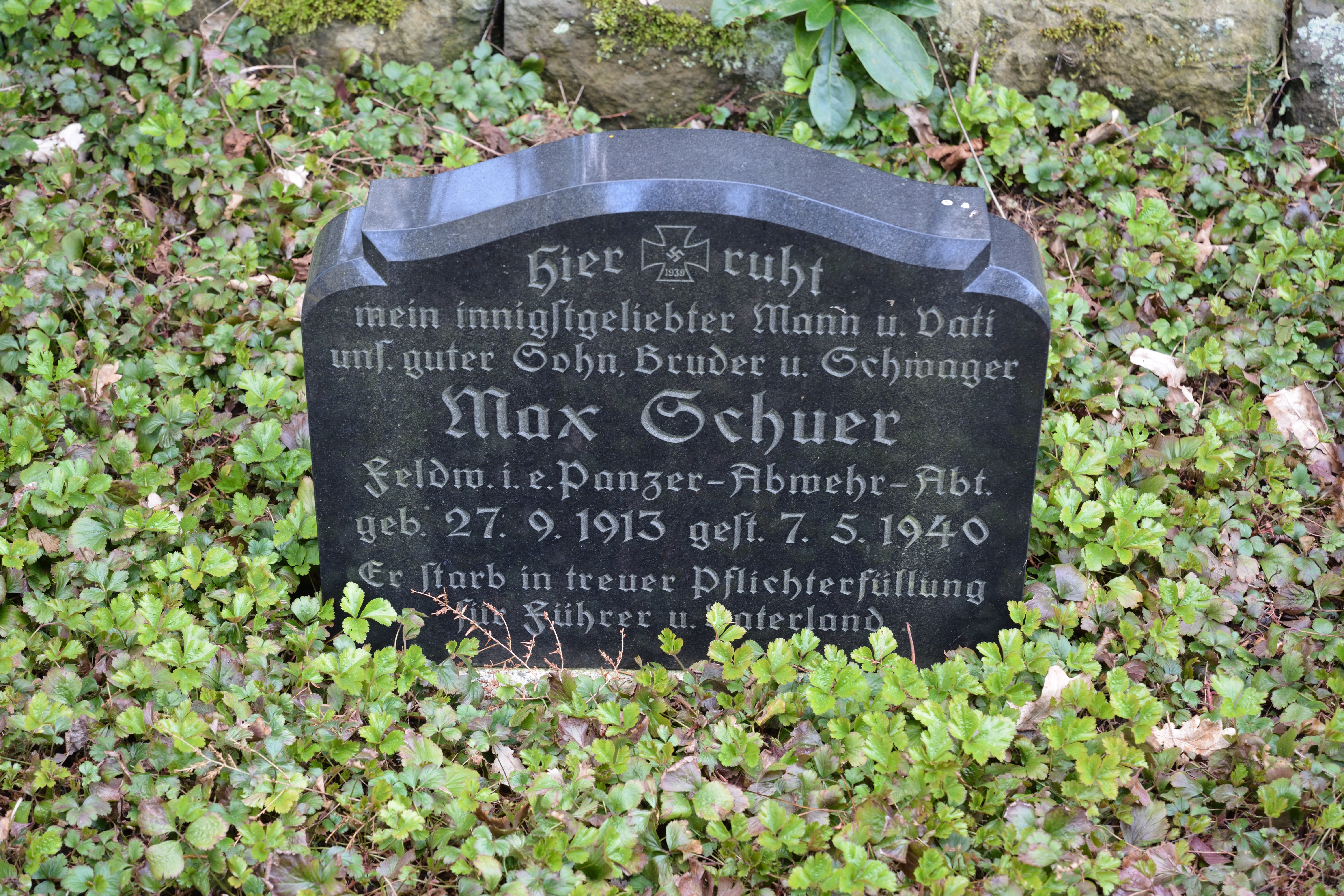 Bilder vom Nordfriedhof in Neumünster